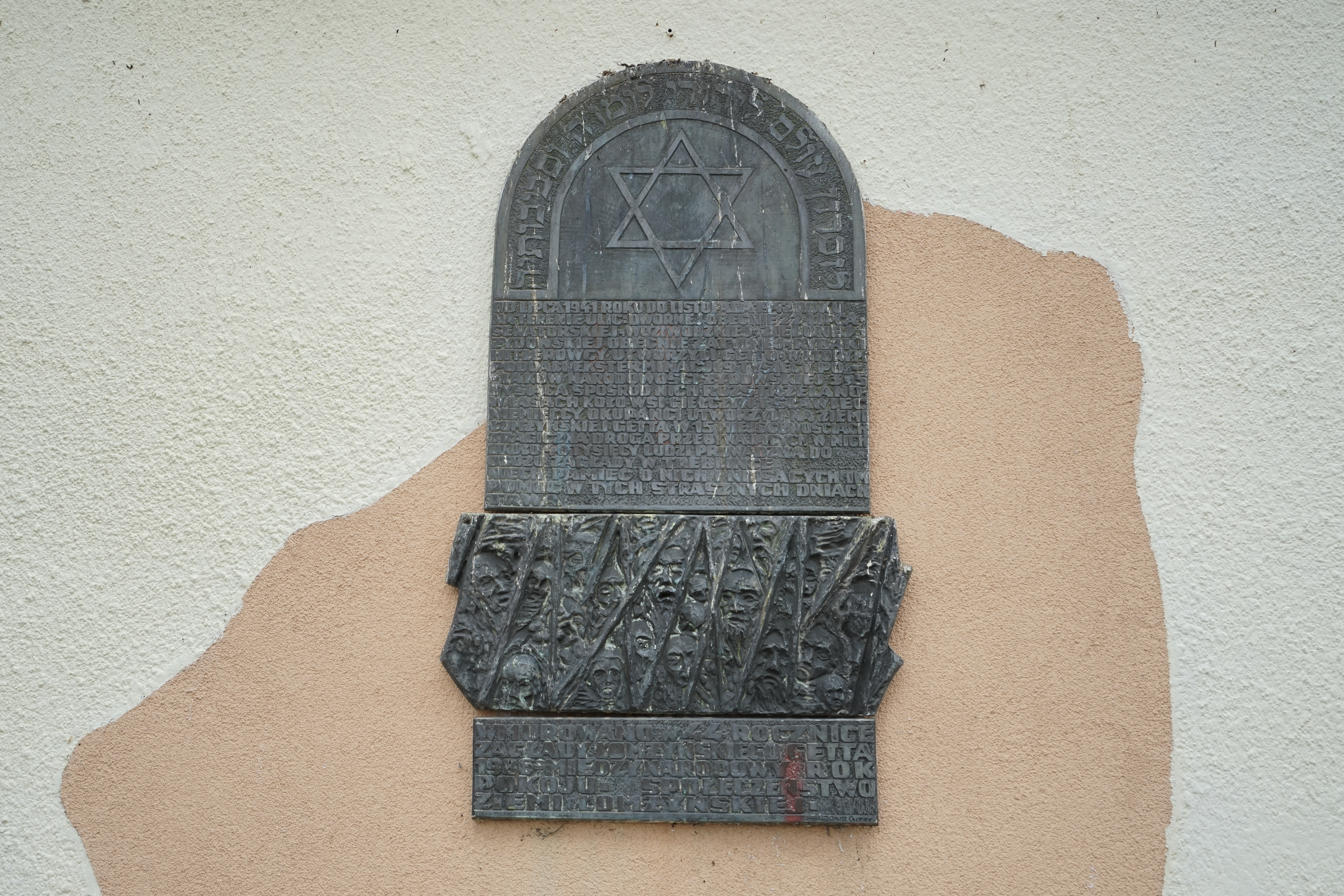 Tablica żydowska umieszczona na budynku przy ulicy Senatorskiej 6 w 44. rocznicę zagłady łomżyńskiego getta.)